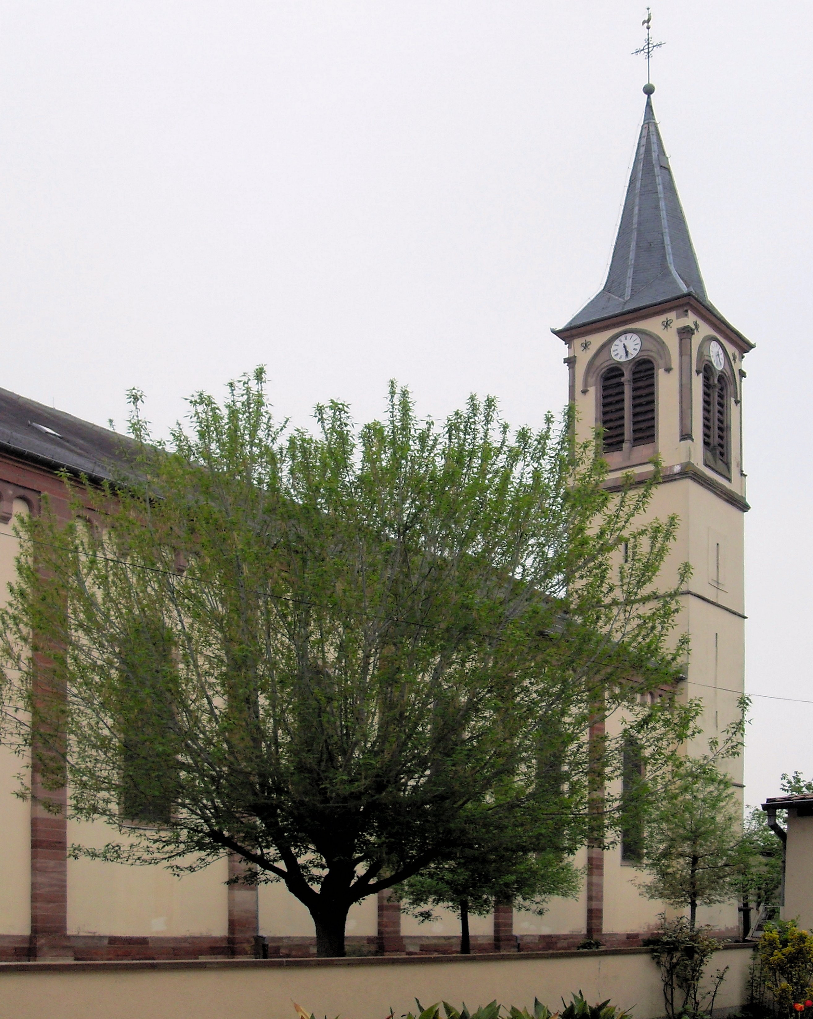 L'église Saint-Pierre et Saint-Paul à Hindisheim